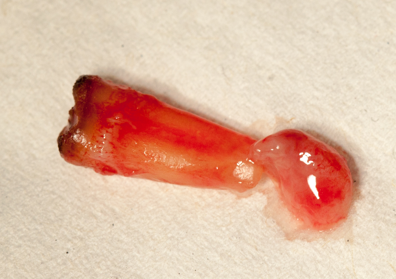 extrahierter Zahn mit apikalem Granulom (vielleicht auch mit apikaler Zyste) - das lässt sich ohne Histologie nicht genau sagen